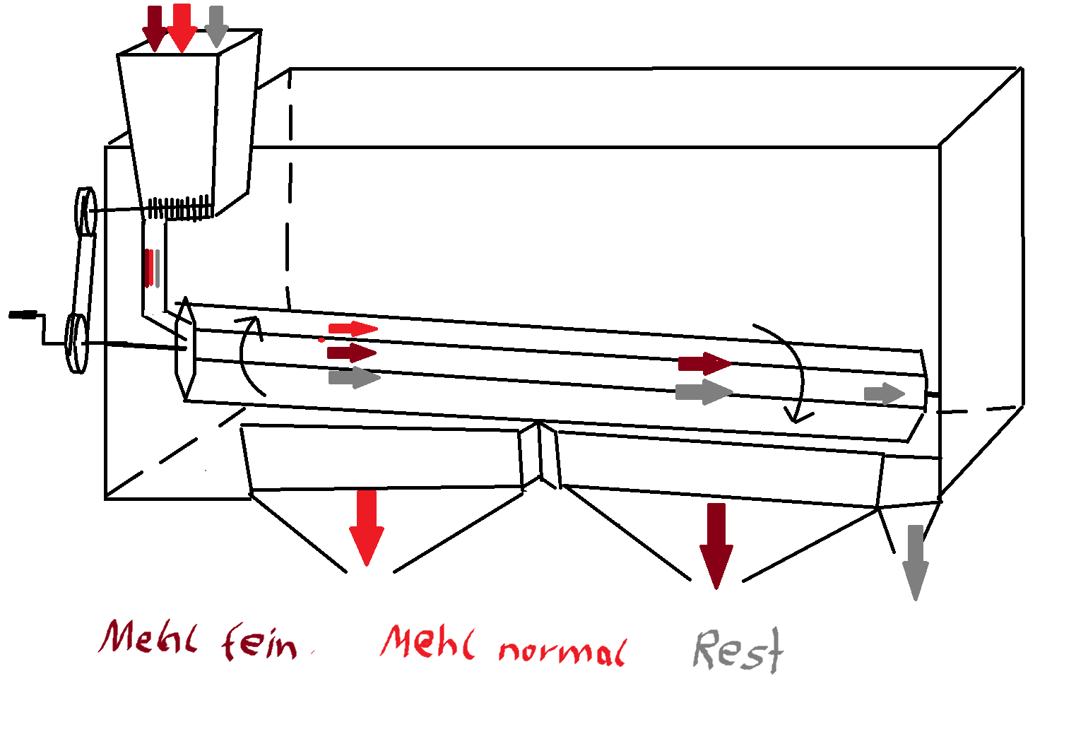 Das Mahlgut wird im Sichter in einer Siebtrommel von der Kleie (Schale) getrennt und in drei Kategorien aufgeteilt. 1.Weißmehl 2.Normales Mehl 3.Kleie (Schale).